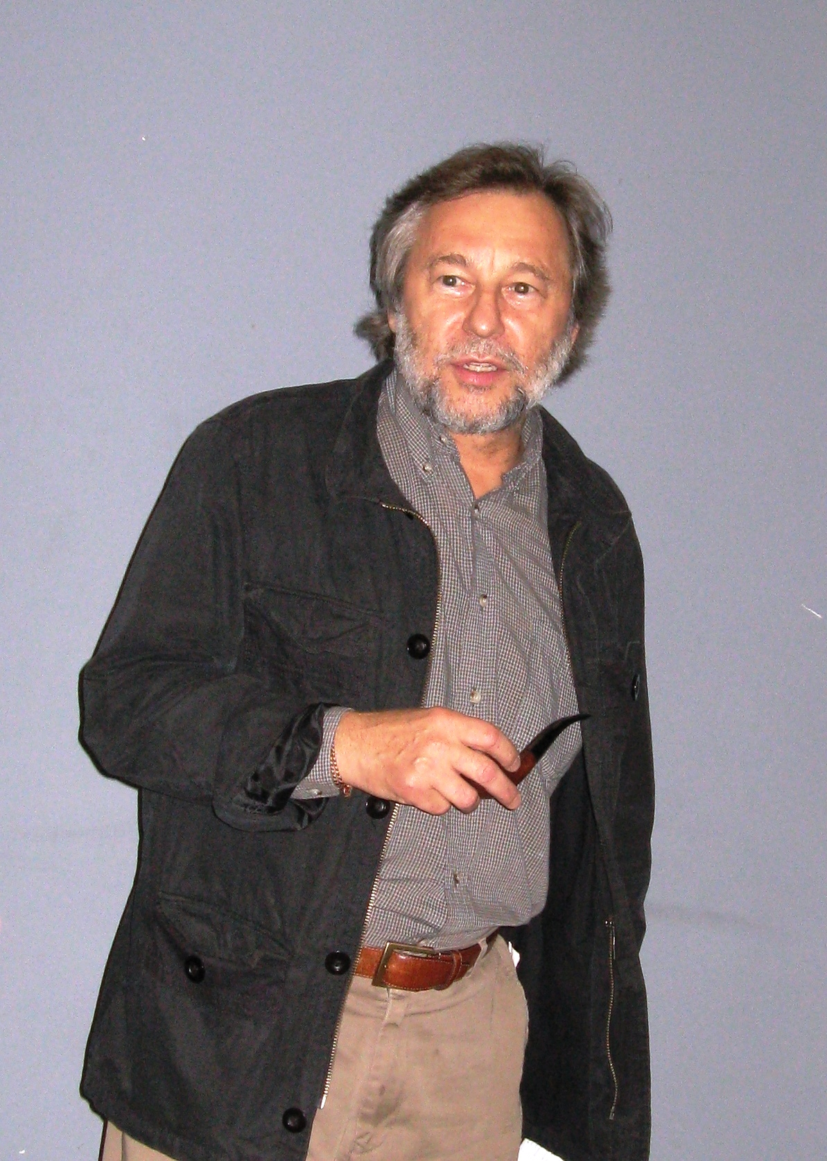 Włodzimierz Staniewski - założyciel i dyrektor teatru w Gardzienicach